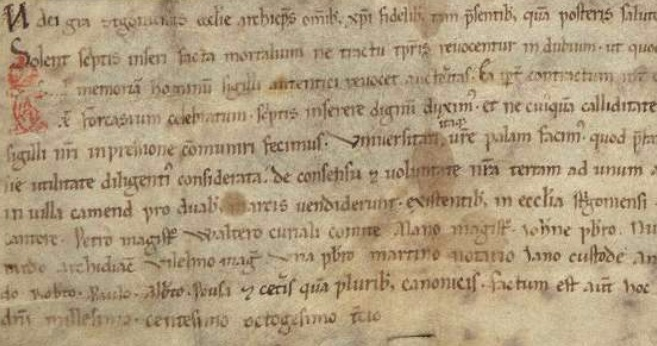 Miklós esztergomi érsek oklevele 1183-ból